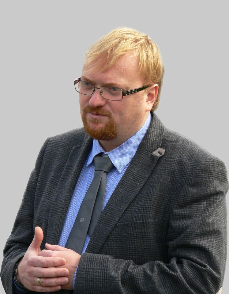 Виталий Валентинович Милонов депутат ЗС СПб